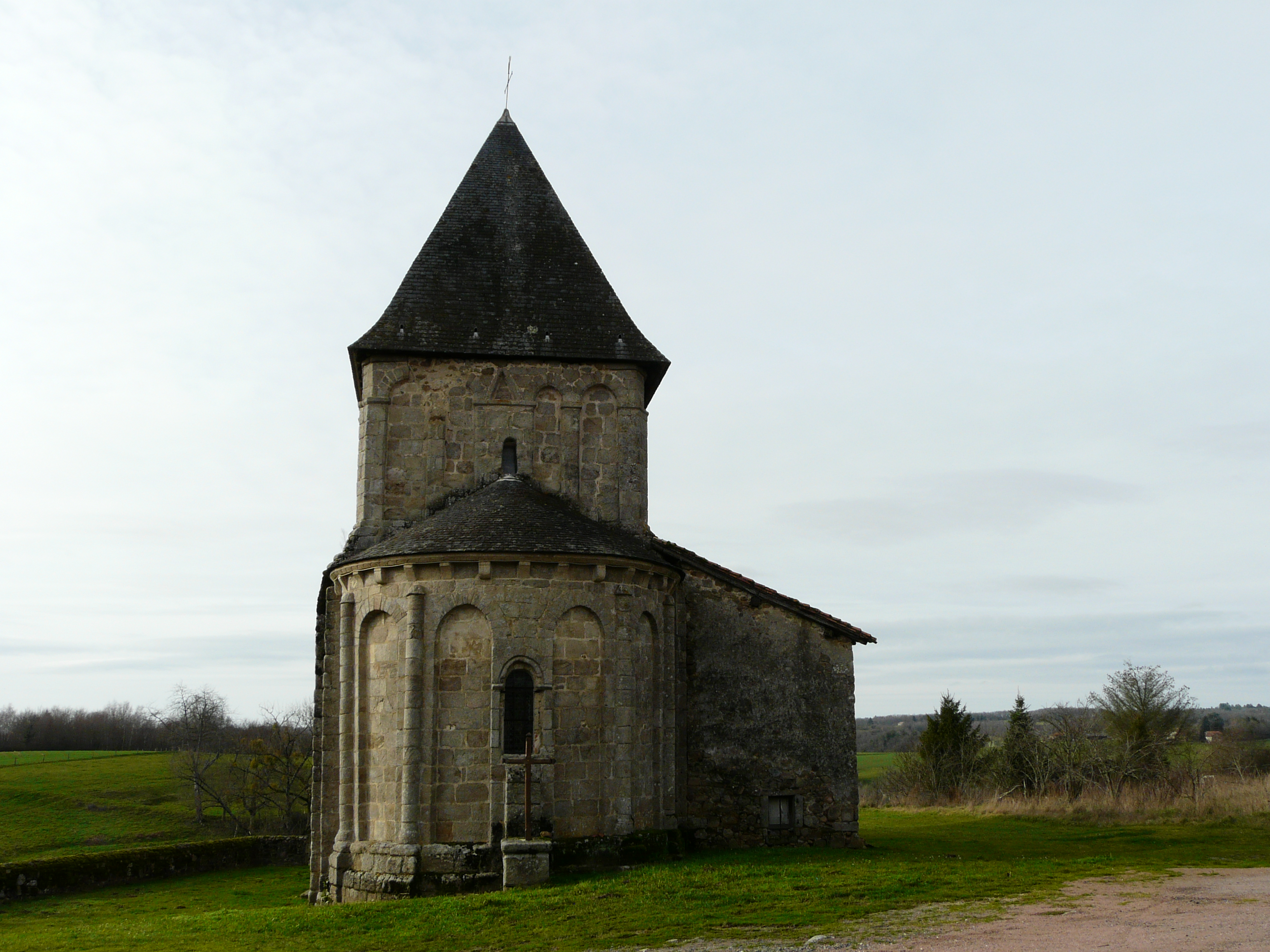 Le chevet de l'église Saint-Paul de Reilhac, Champniers-et-Reilhac, Dordogne, France.